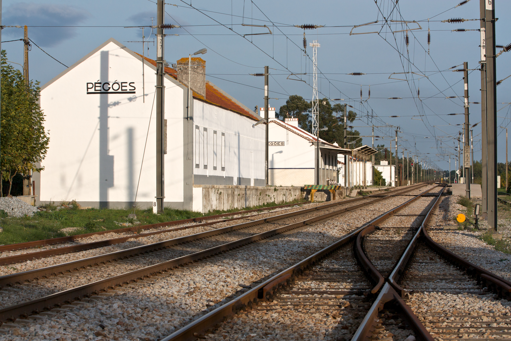 Tipo: ES [Estação Satélite] Local: Pegões-Gare [Linha do Linha do Alentejo, PK 41] Data e hora: 18 de Novembro de 2009 [16h19]